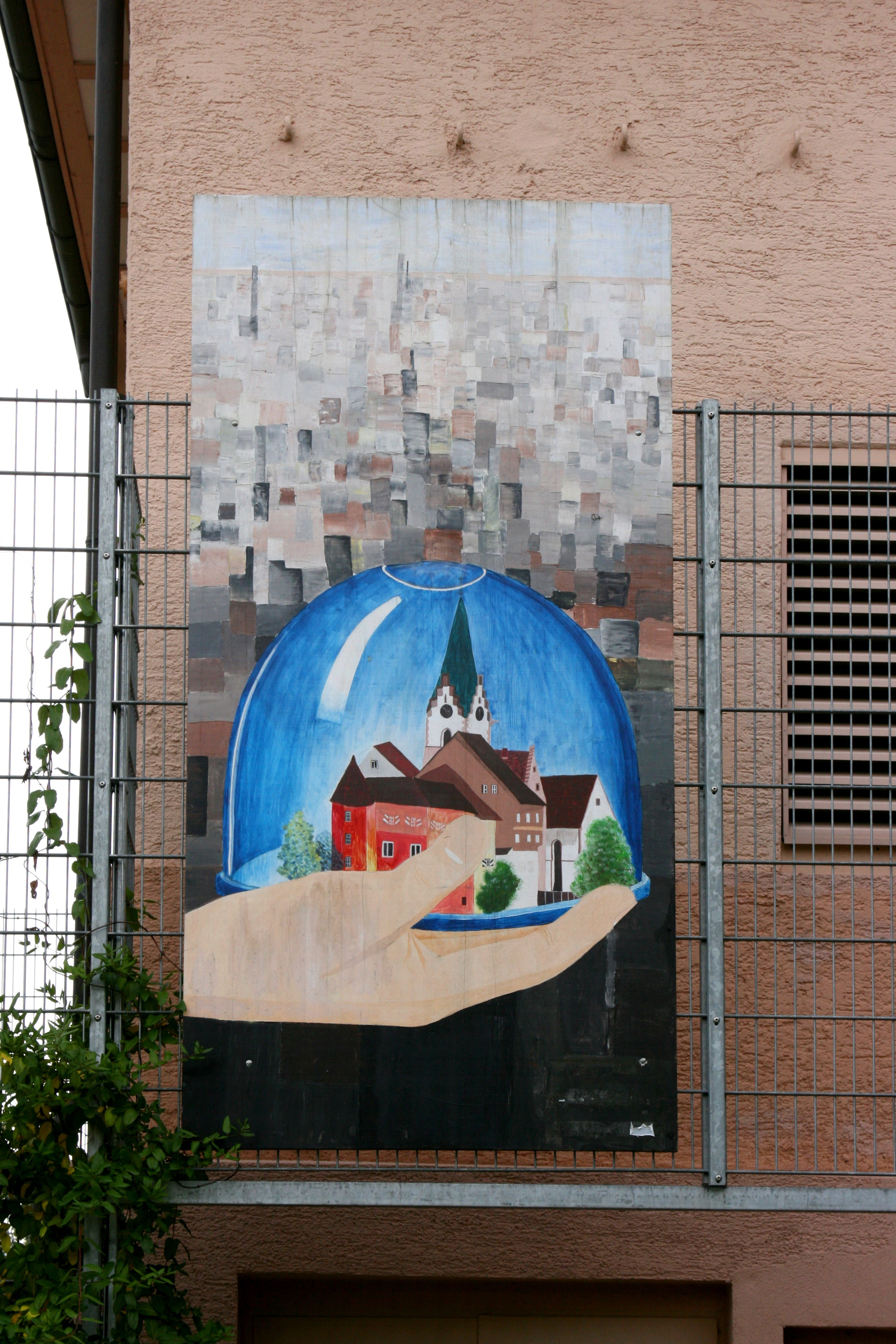 Breitestraße in Engen